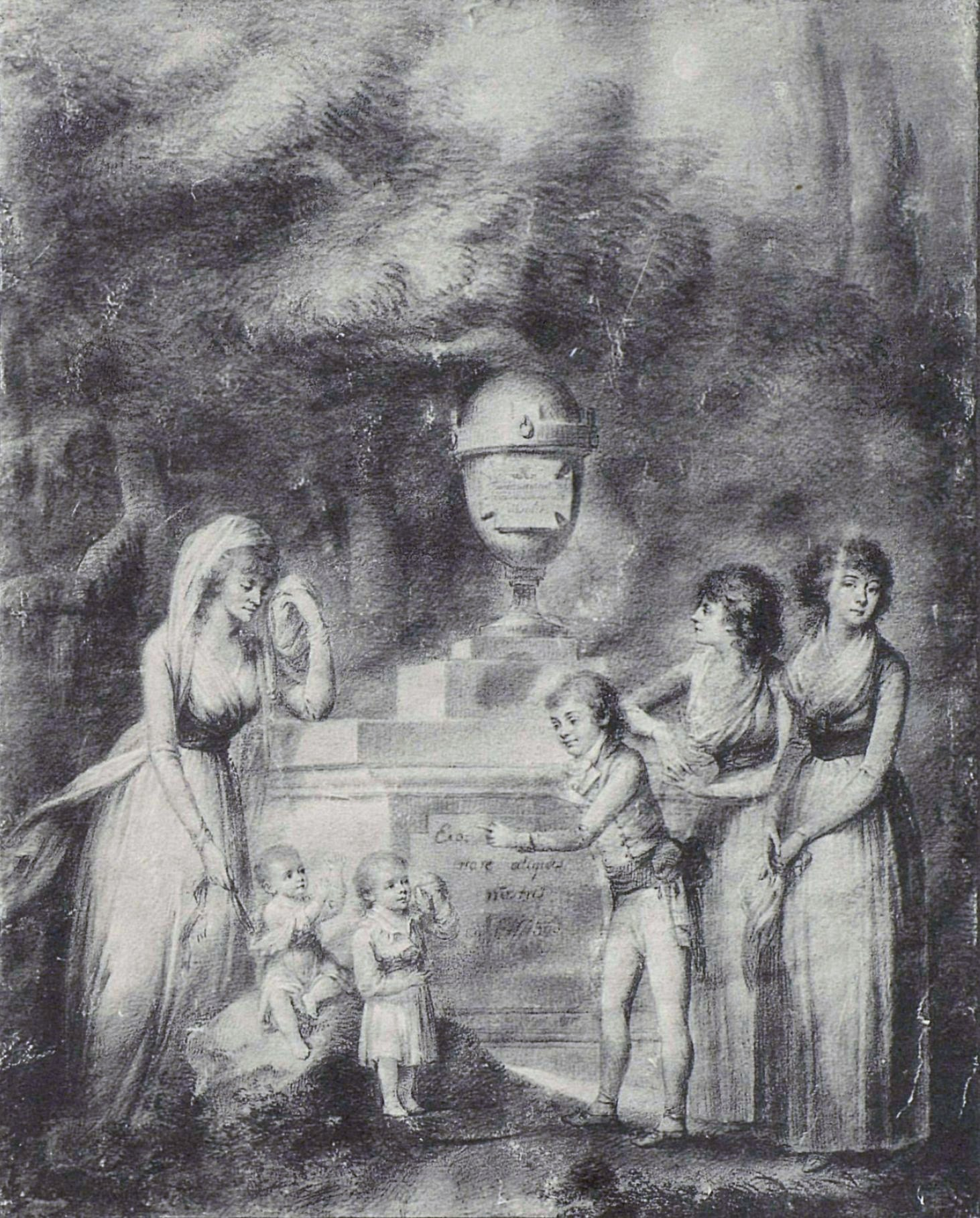 Слева от урны с прахом кн. А. С. Четвертинского стоит его вдова Колетта Адамовна ур. Холоневская, с двумя своими малолетними сыновьями, Константином и Густавом; с правой стороны изображены дети князя Четвертинского от первого его брака: сын Борис Антонович и дочери Мария Антоновна, в замужестве Нарышкина, и Жанетта, в замужестве за Вышковским. Рисунок этот княгиня Четвертинская преподнесла в дар барону К. Я. Бюлеру.